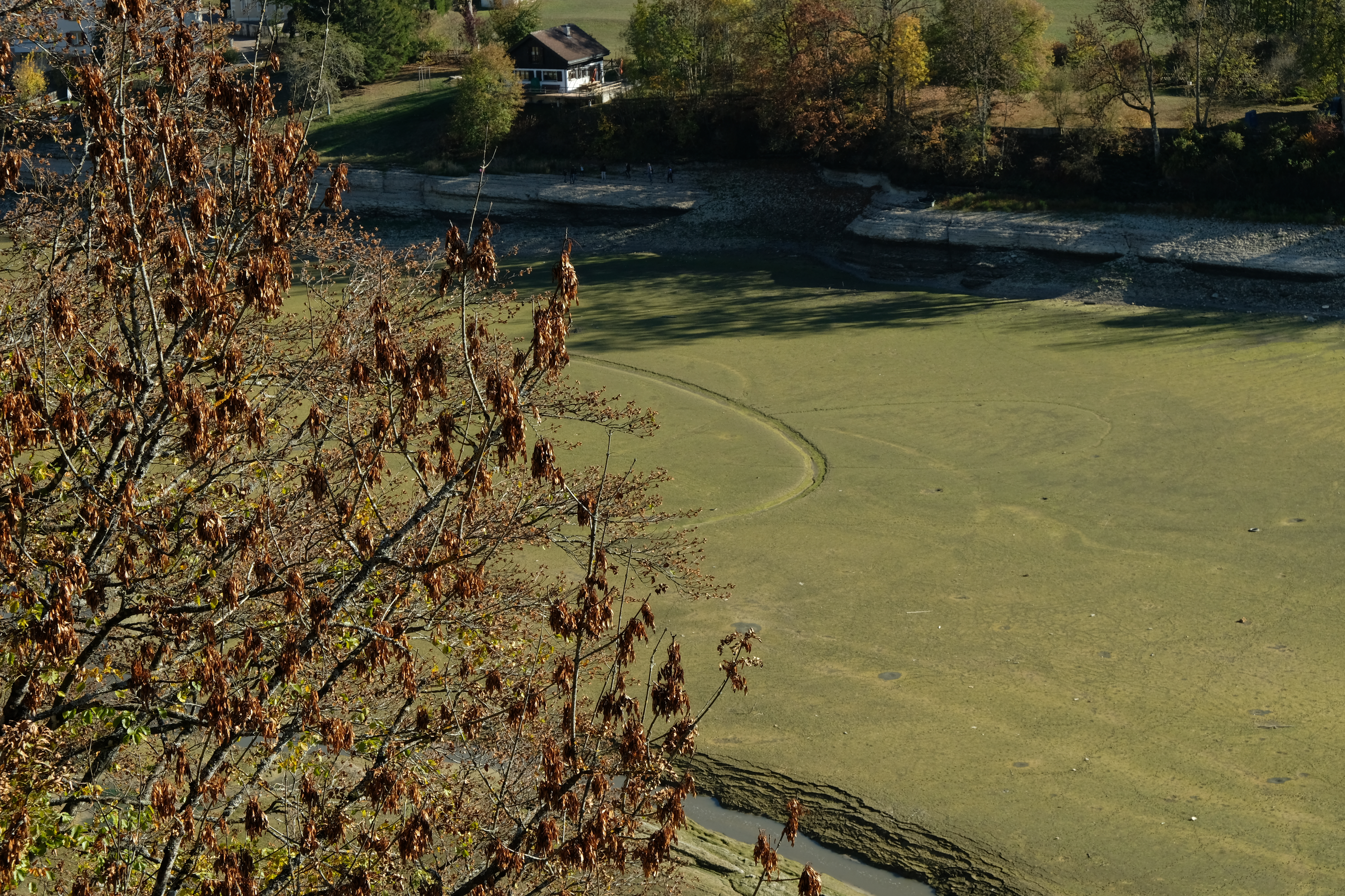 Le lac de Chaillexon (bassins du Doubs) à sec en octobre 2018 vur depuis la route des Combes à Villers-le-Lac.